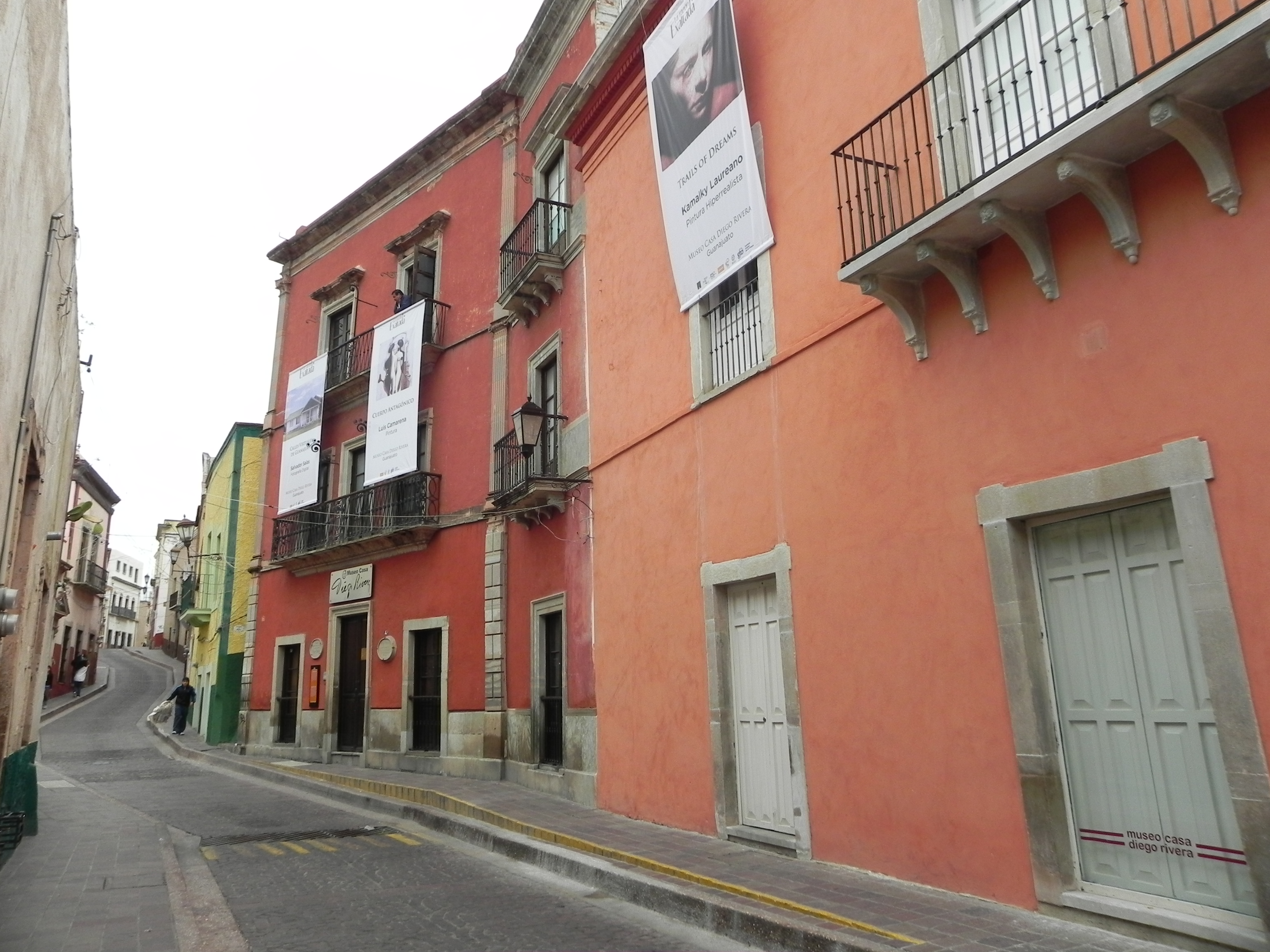 Casa Museo Diego Rivera